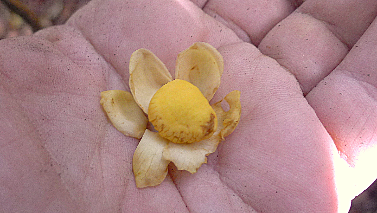 Eschweilera alvimii S.A.Mori